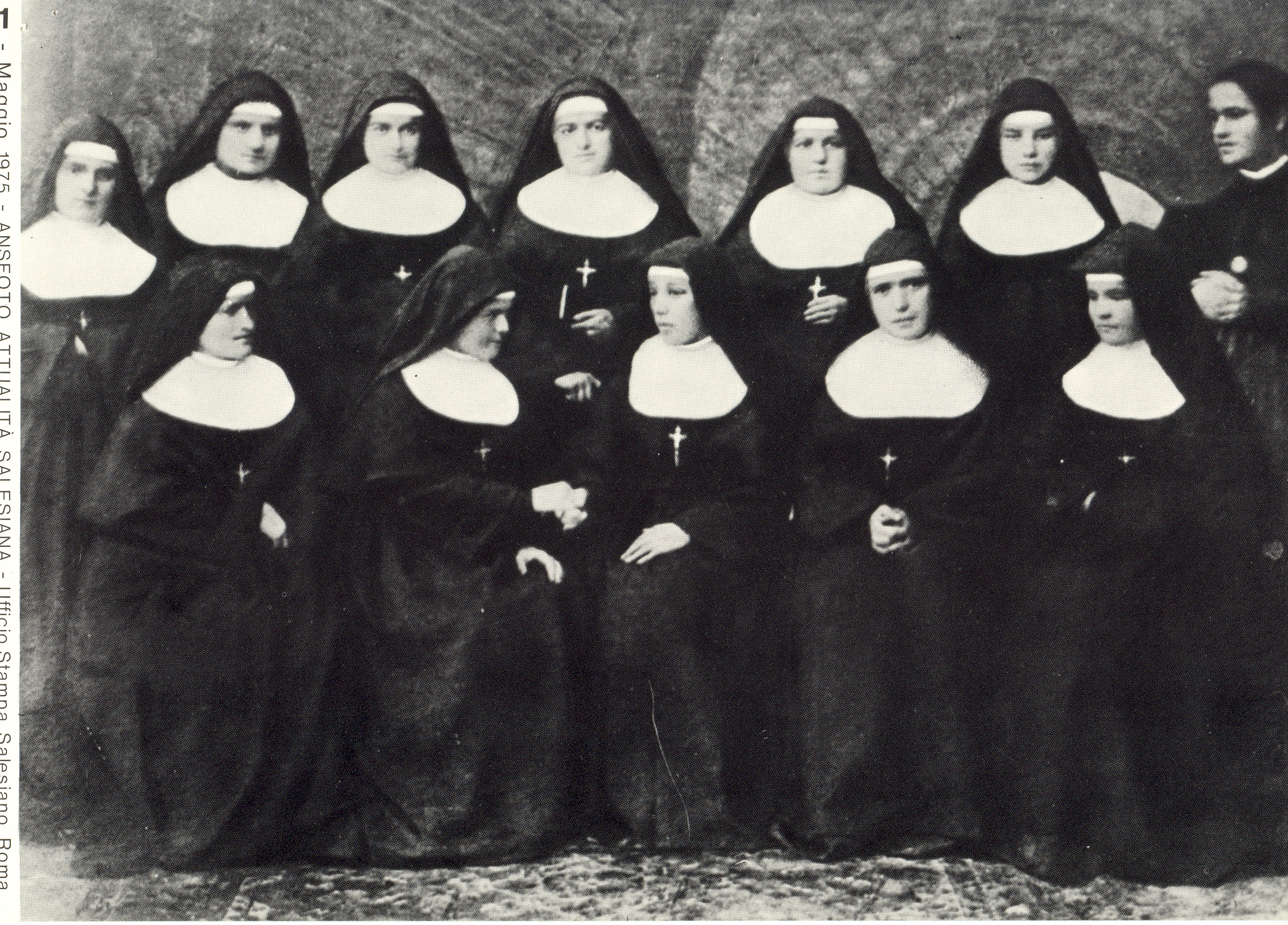 Фотография, сделанная перед первой миссией FMA в Америку в 1879 году